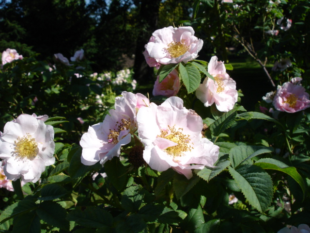 Rosa 'Arne' (Hybrid Rugosa)